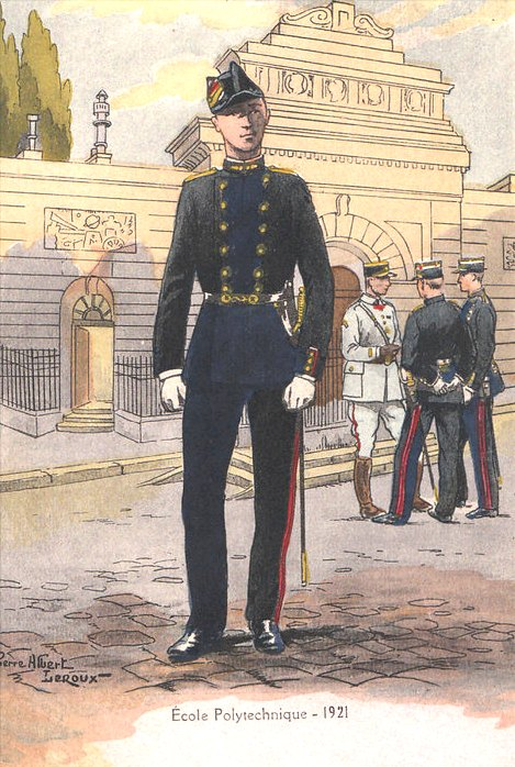 École polytechnique 1921. Élève en Grand Uniforme devant le portail du 5 rue Descartes. En couleurs.